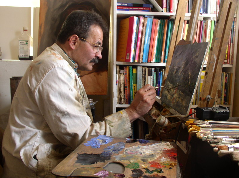 This is a photo of my dd, painting a picture.